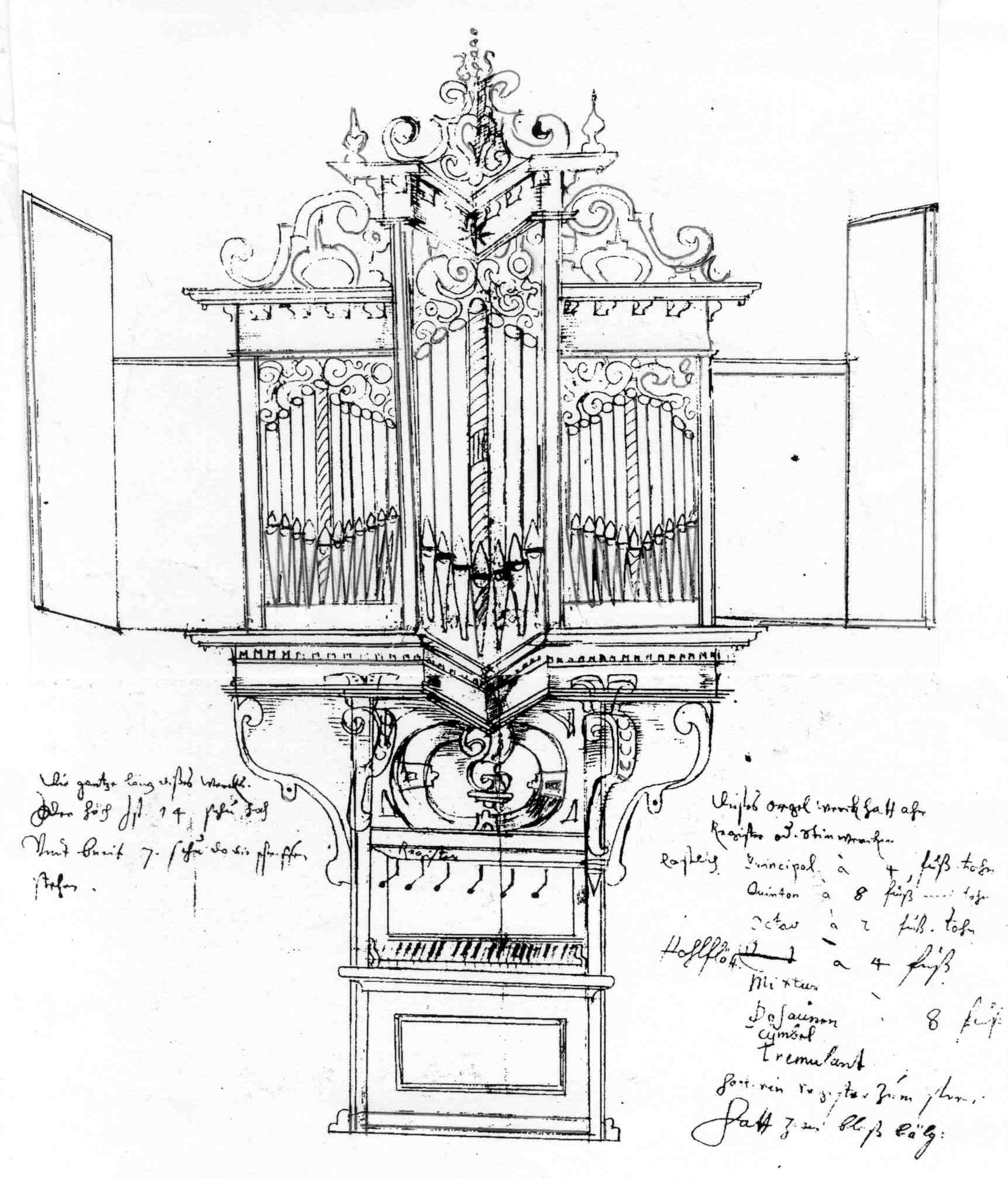 Drawing Georg Henrich Wagner: Organ in Breidenbach, District Marburg-Biedenkopf, Hesse, Germany